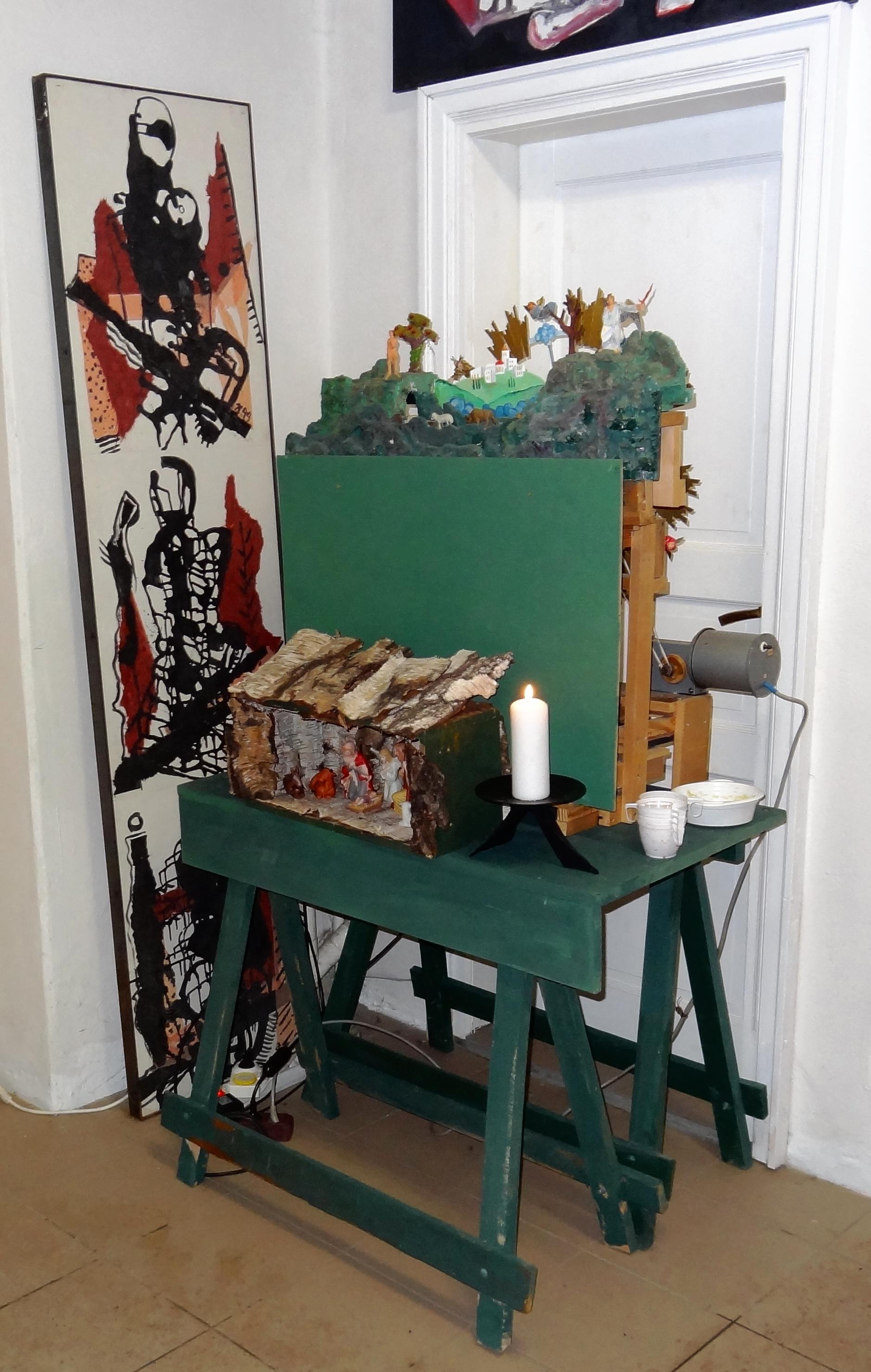 Krippe, Bild und mechanische Grippe in der alten Schule Fürstenau von der Künstlerfamilie Stephan.